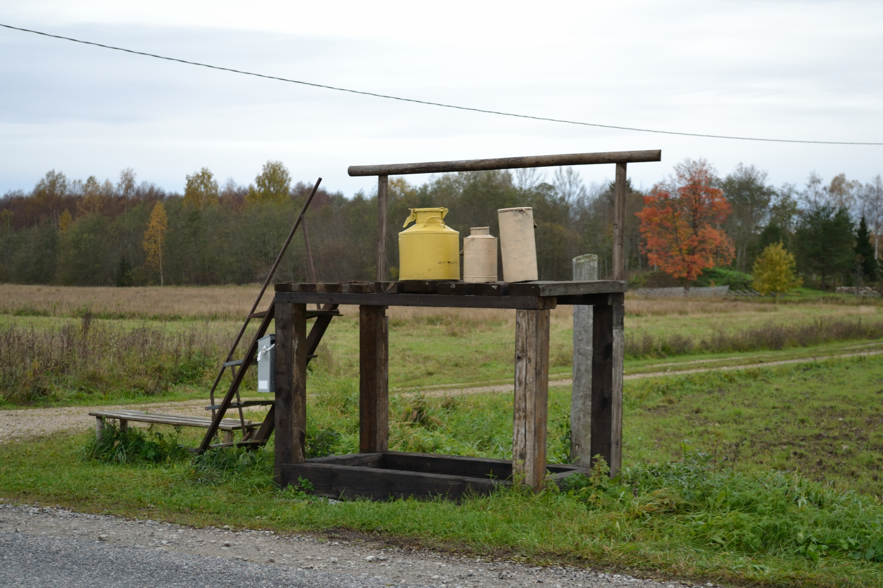 Piimapukk Vardi–Nurme teel